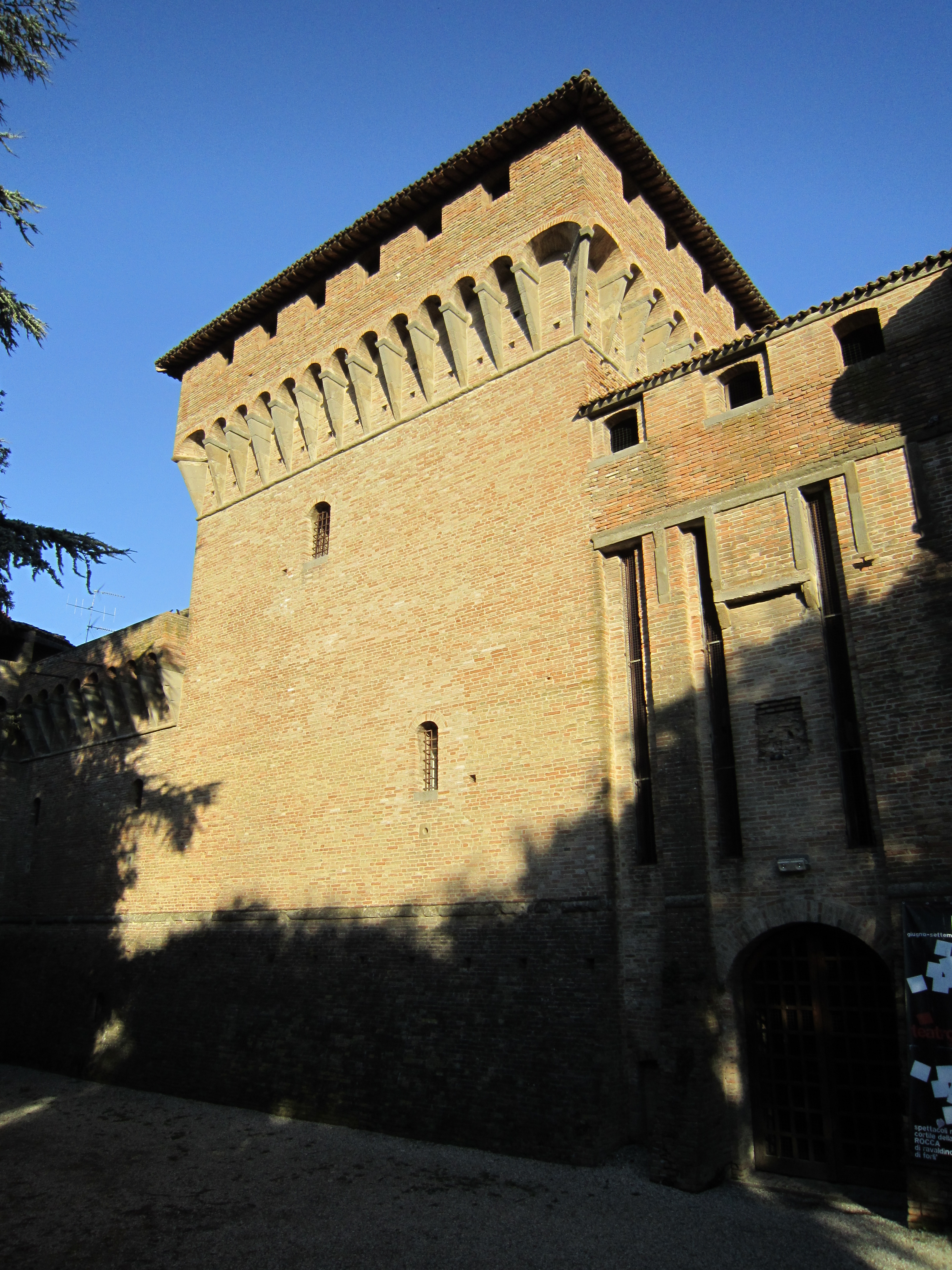 Mastio della Rocca di Ravaldino, foto propria